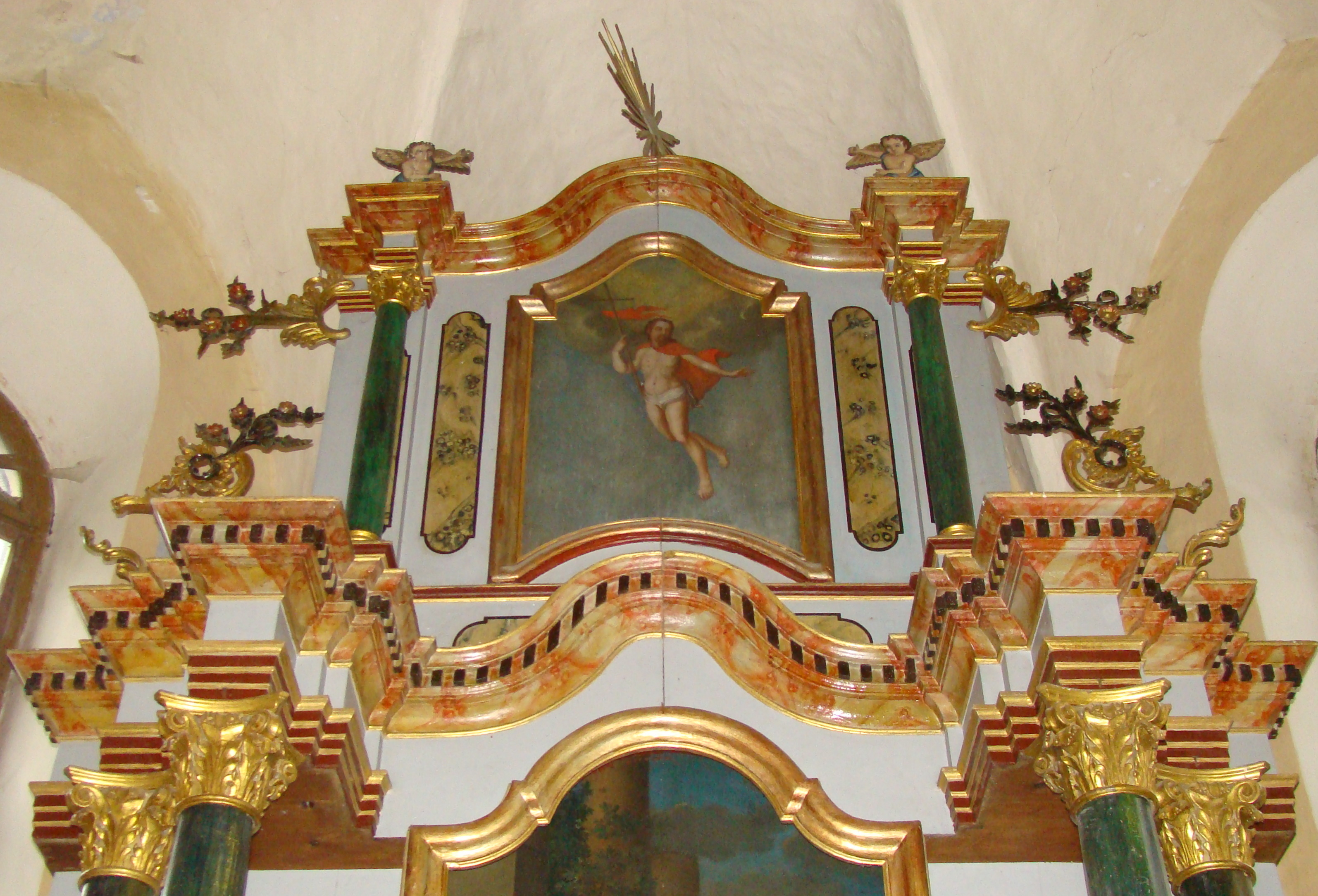 Biserica evanghelică fortificată, sat Agârbiciu; comuna Axente Sever, județul Sibiu 01